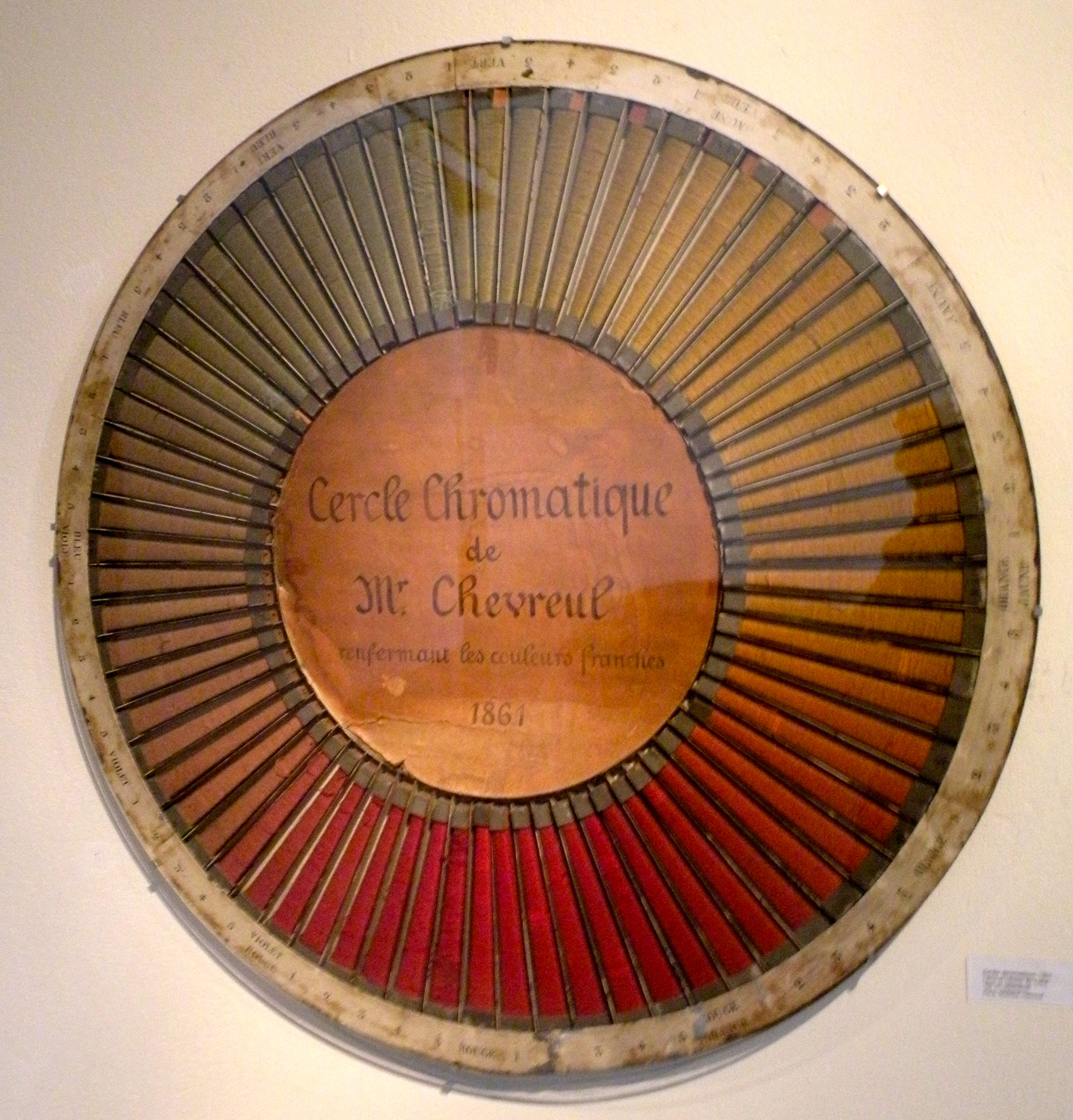 cercle chromatique au musée de la tapisserie de beauvais